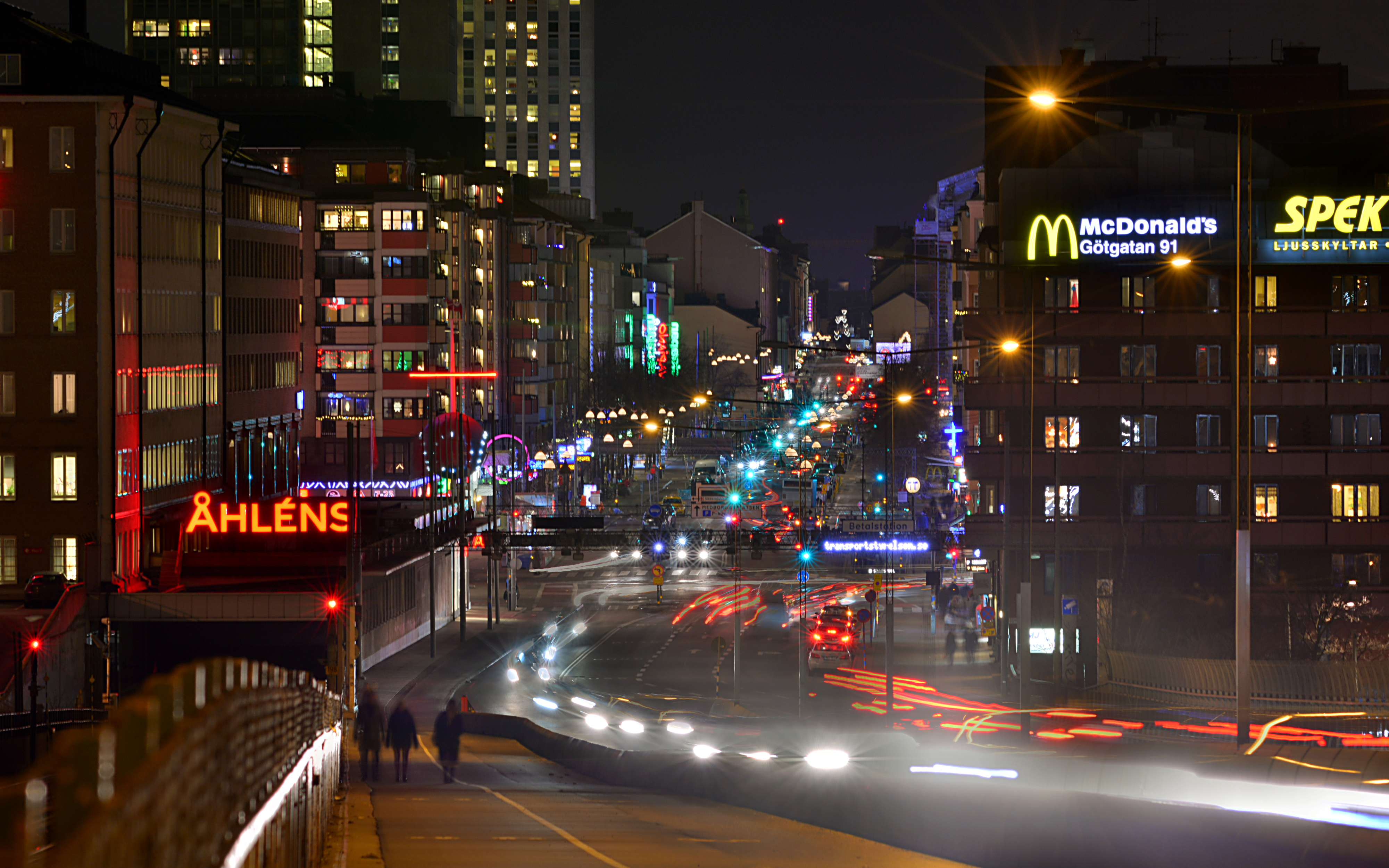 Götgatan fotograferad från Skanstullsbron